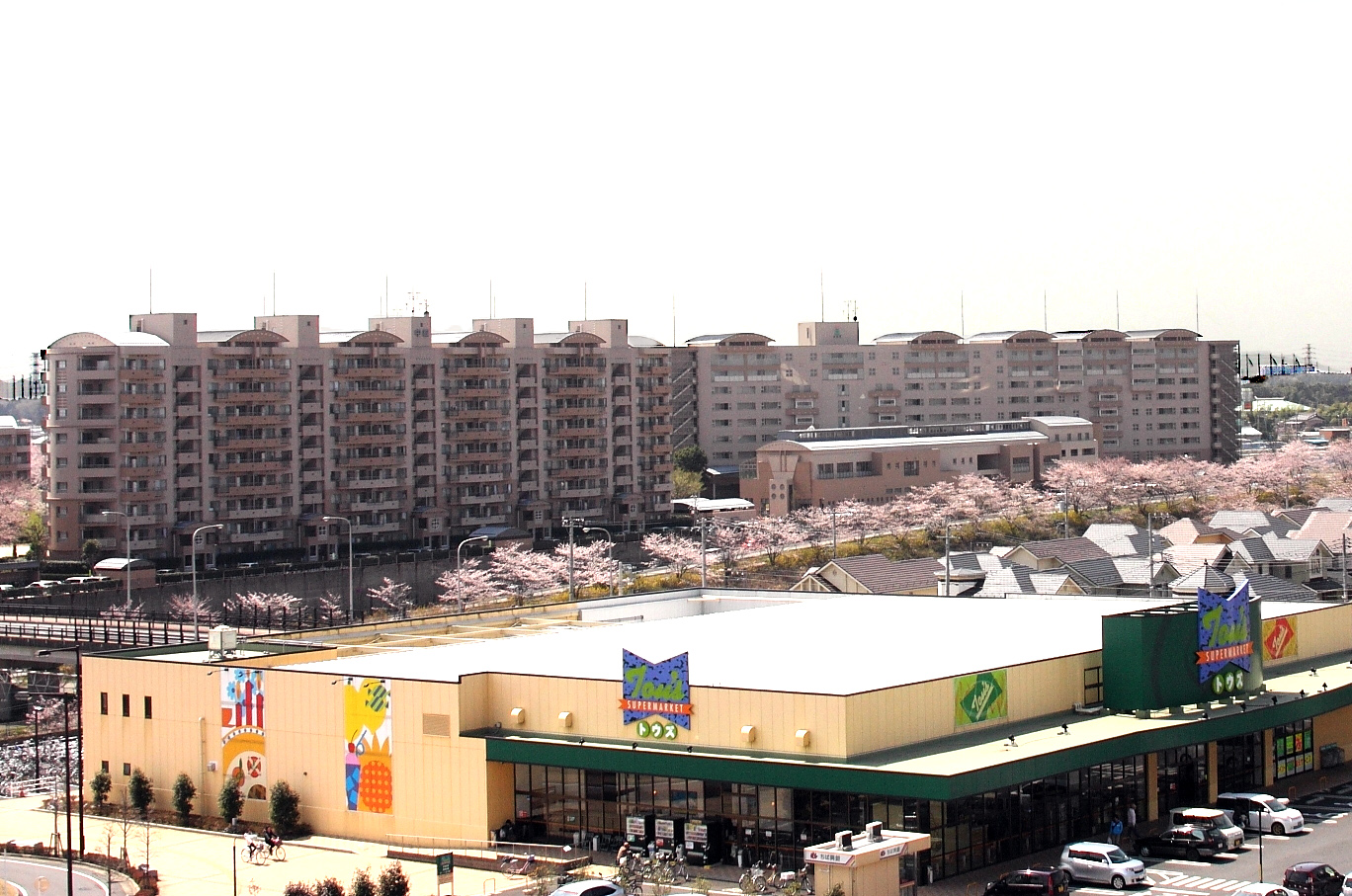 白井PRISTAから中銀マンションを眺める